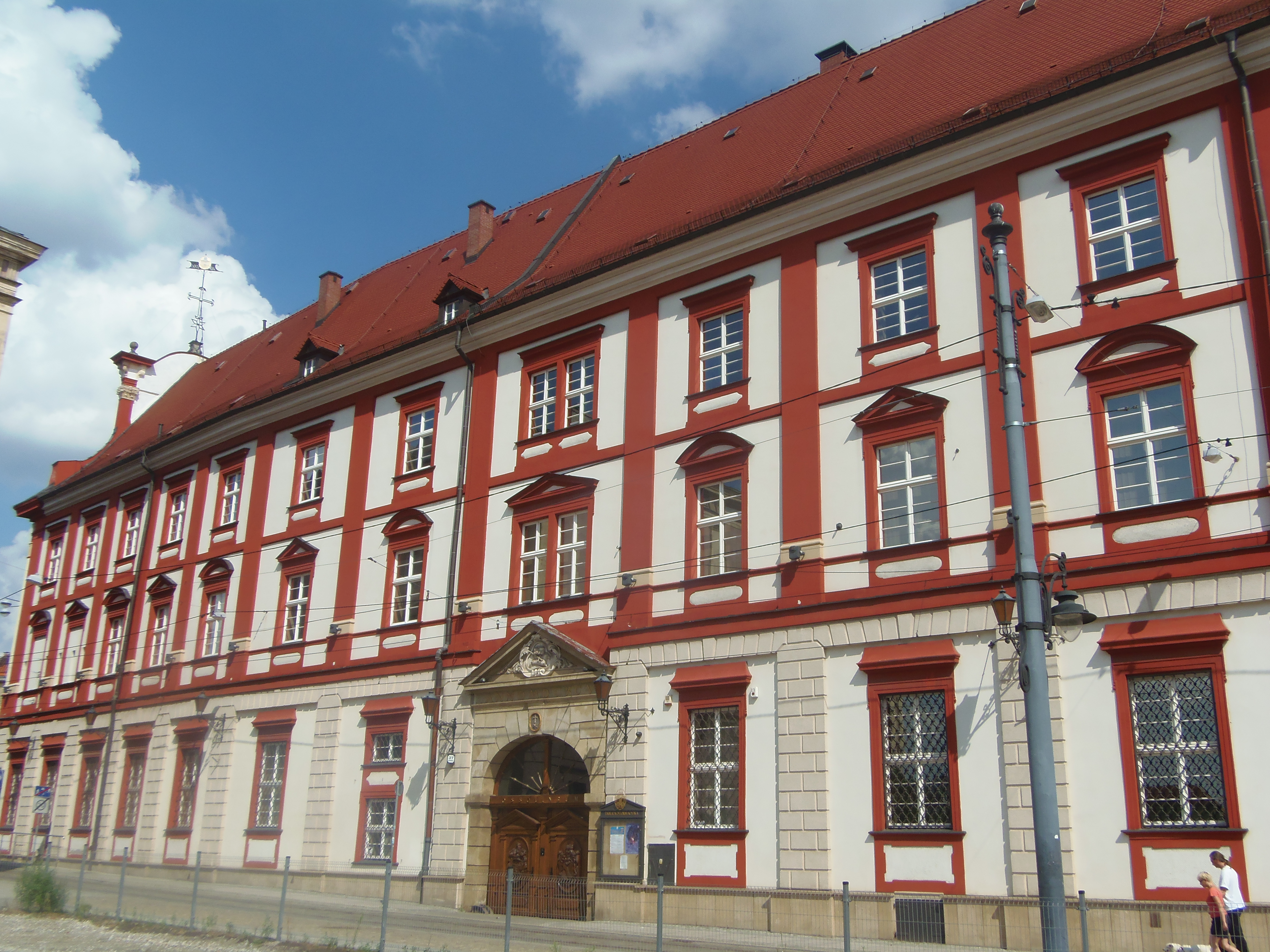 Budynek Ossolineum we Wrocławiu English | Polski | +/−